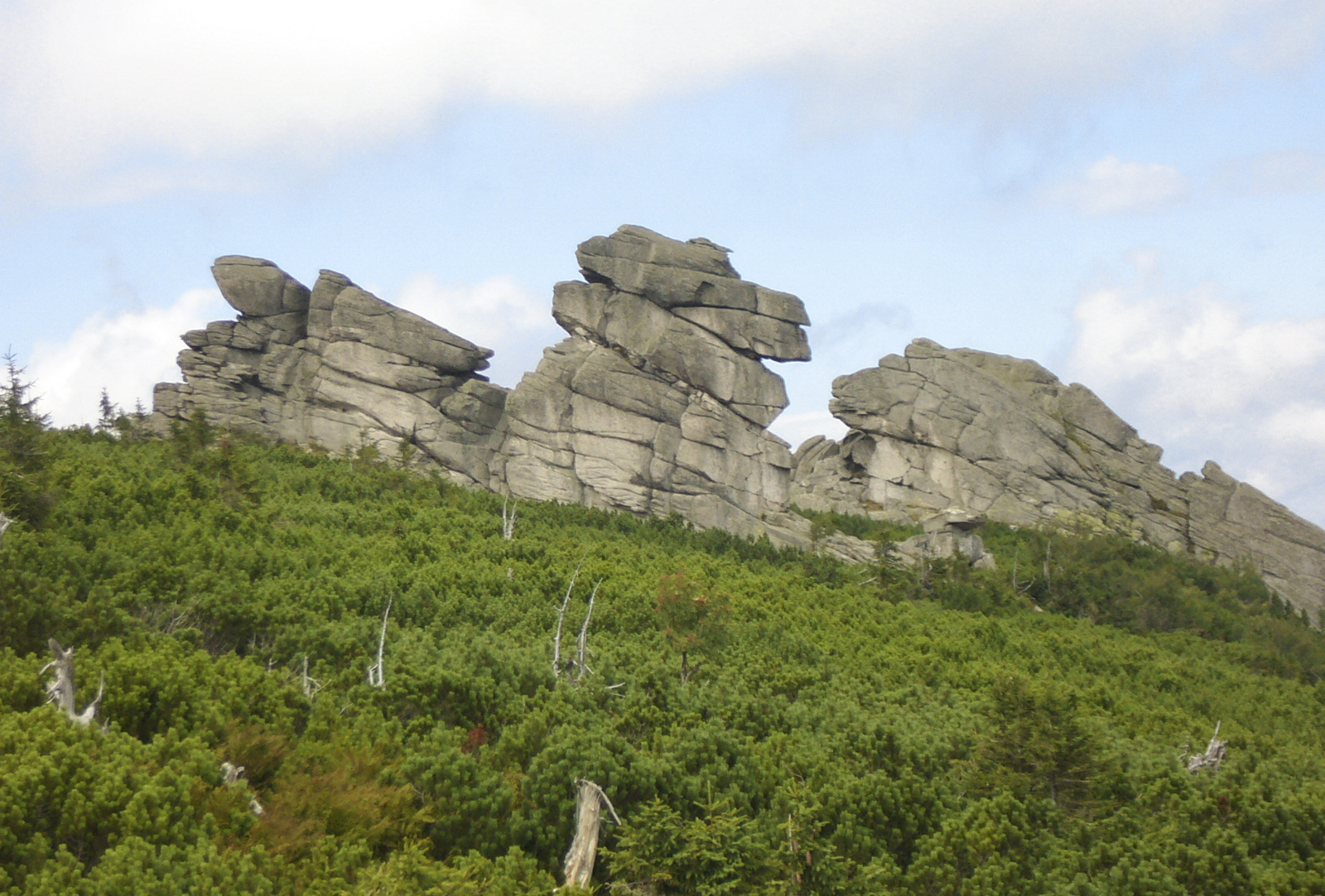 Grupa skalna "Końskie Łby" w masywie Szrenicy w Karkonoszach